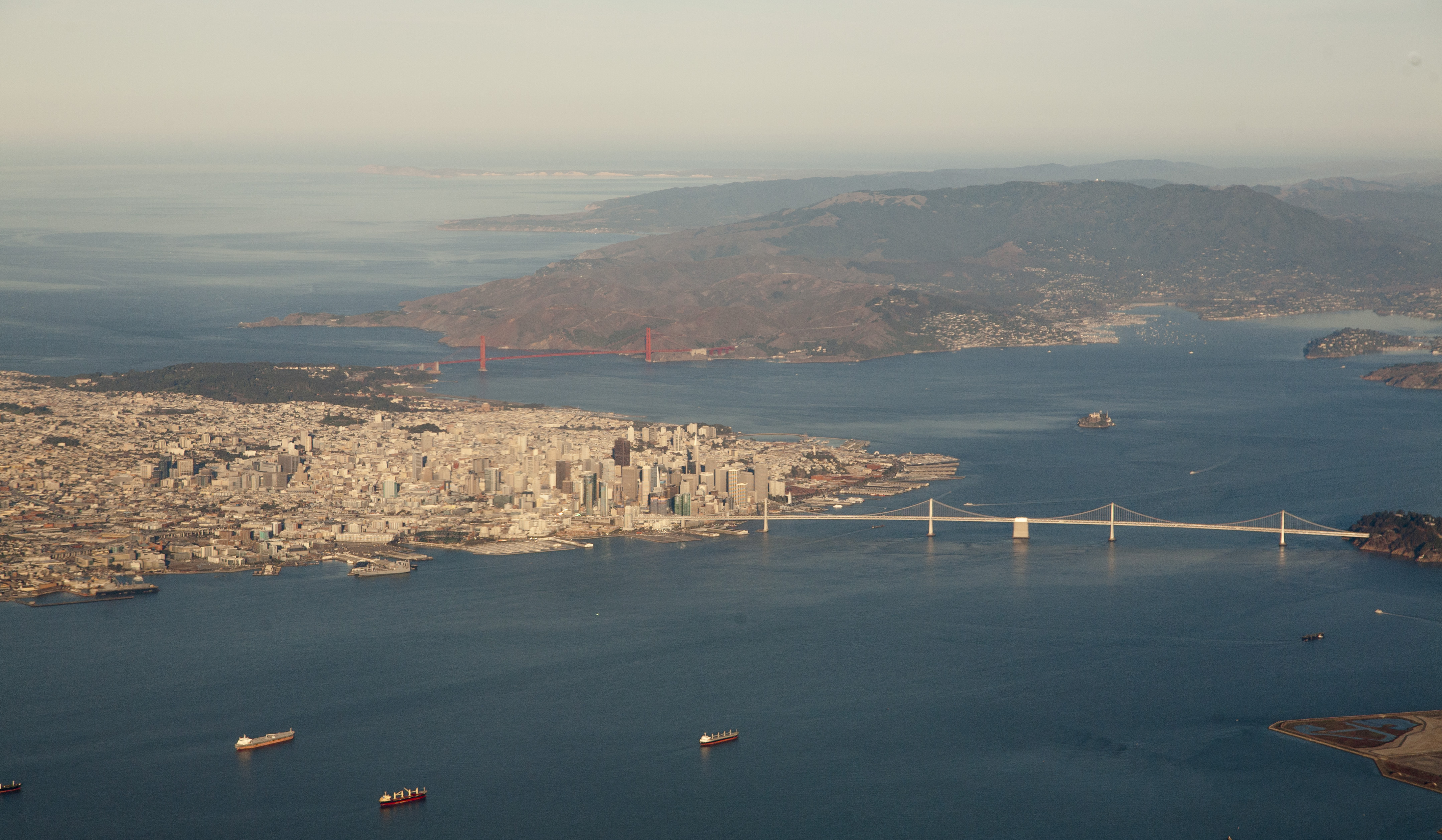 2014_11_05 San Francisco on departure from SFO